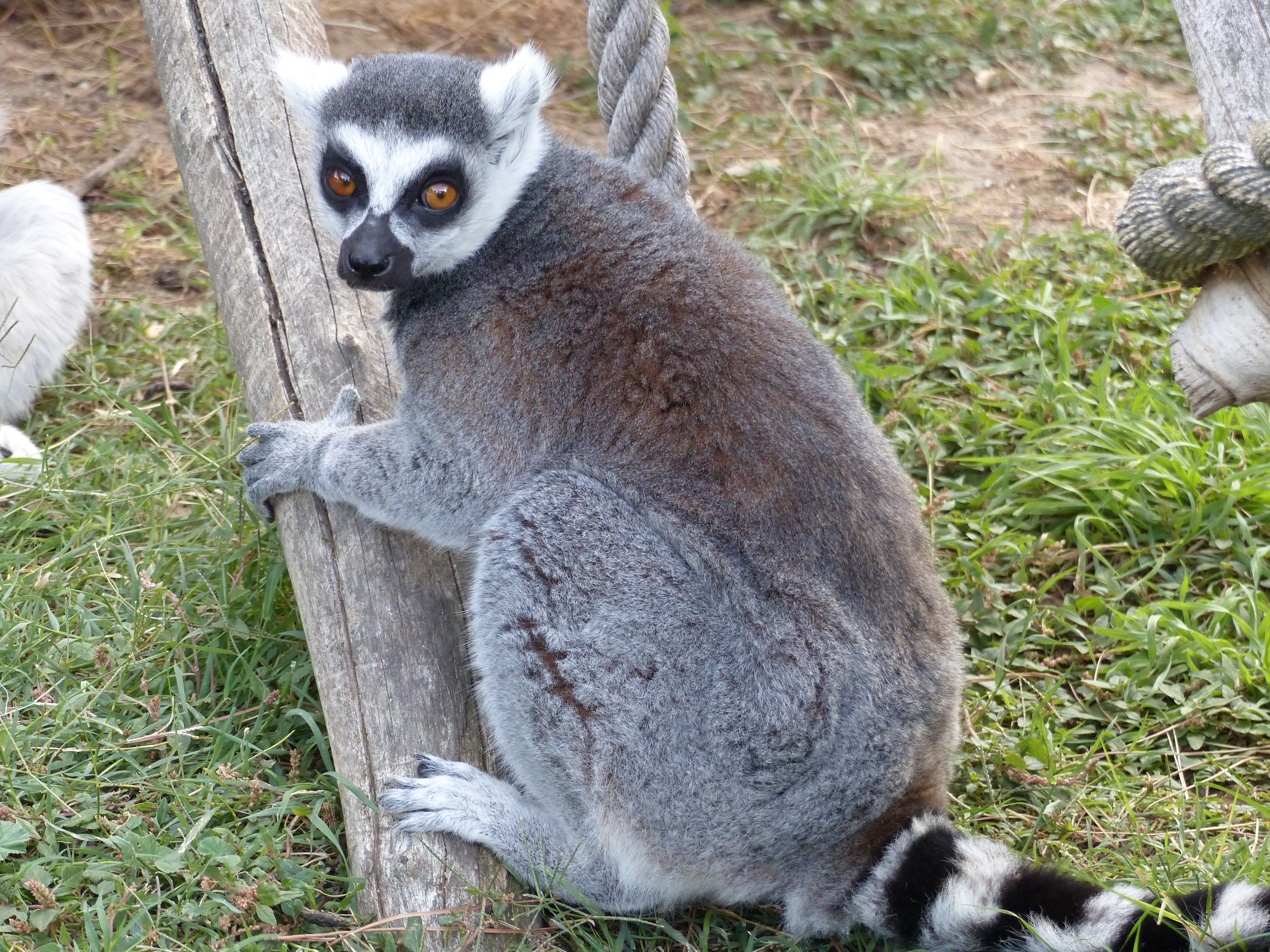 Lemures, Zoo de Madrid, España